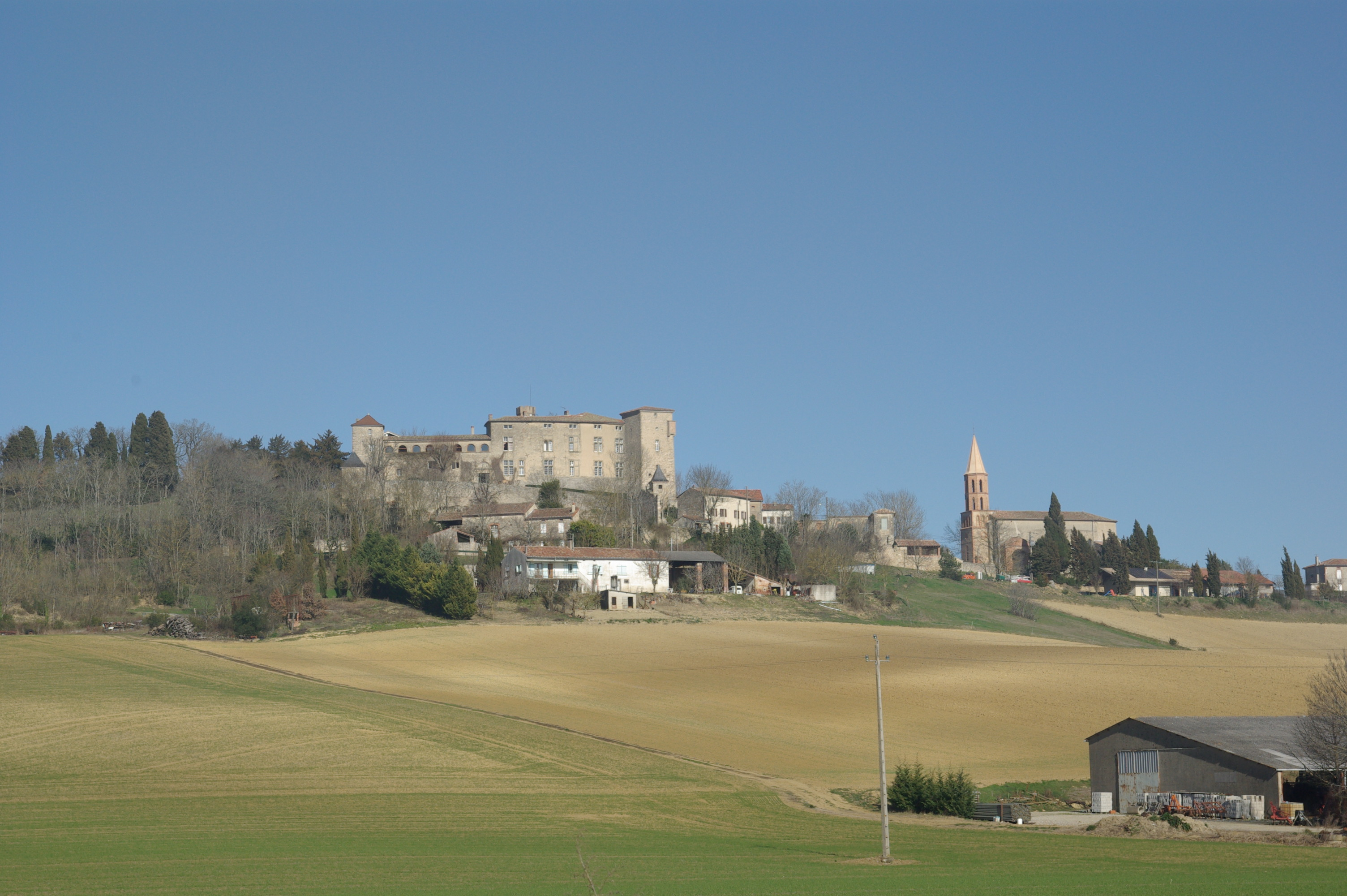 France, Tarn (81), Montgey, château de Montgey